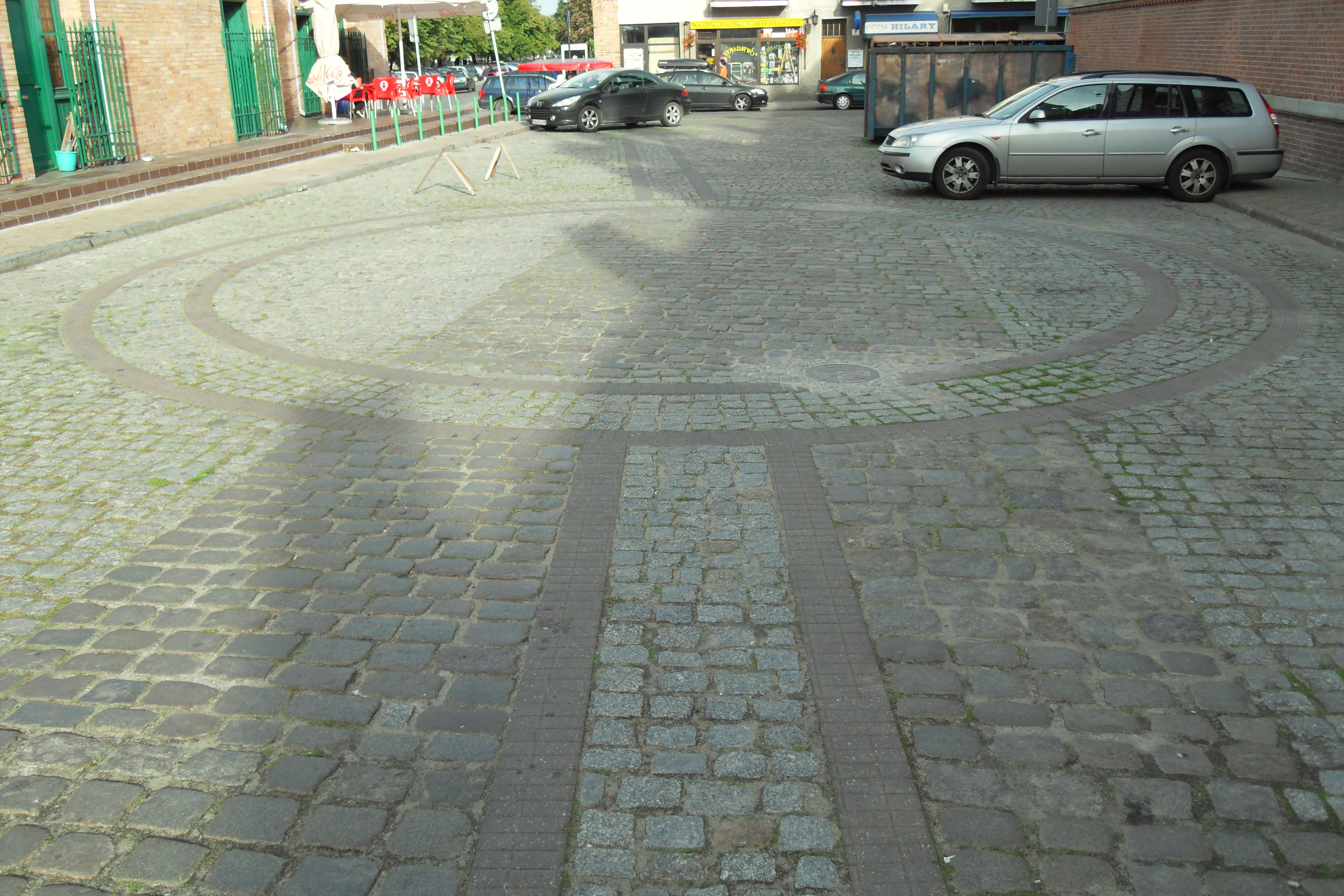 Gdańsk Główne Miasto, obrys nieistniejącej Baszty Dominikańskiej.